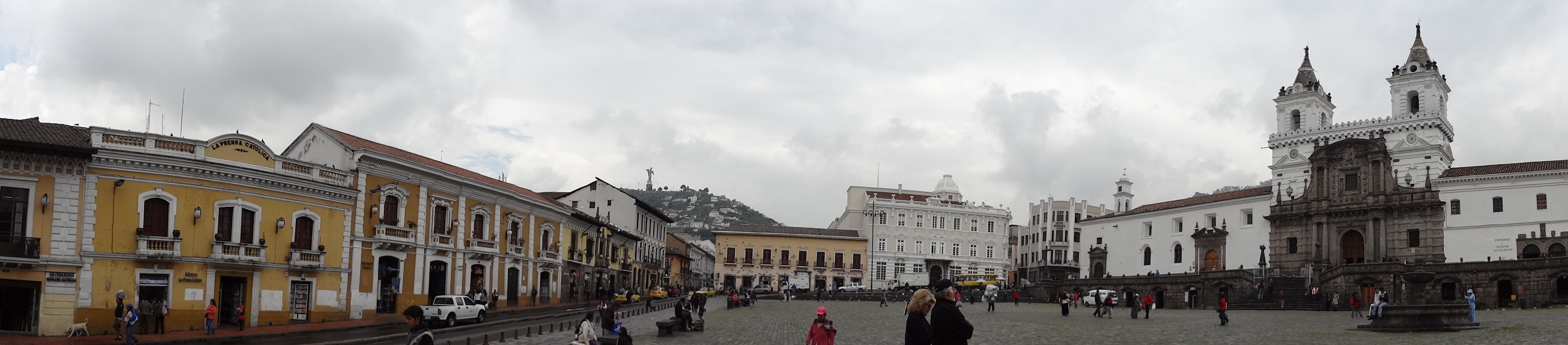 Iglesia de San Francisco es un monumental edificio católico que se yergue en medio del centro histórico de la ciudad de Quito, frente a la plaza del mismo nombre. El imponente edificio ostenta el privilegio de ser el conjunto arquitectónico de mayor dimensión dentro de los centros históricos de toda América y por ello es conocido como "el Escorial del Nuevo Mundo". San Francisco es, además, una verdadera joya de la arquitectura continental por su amalgama de diferentes estilos armoniosamente combinados a lo largo de sus más de 150 años de construcción. wikipedia